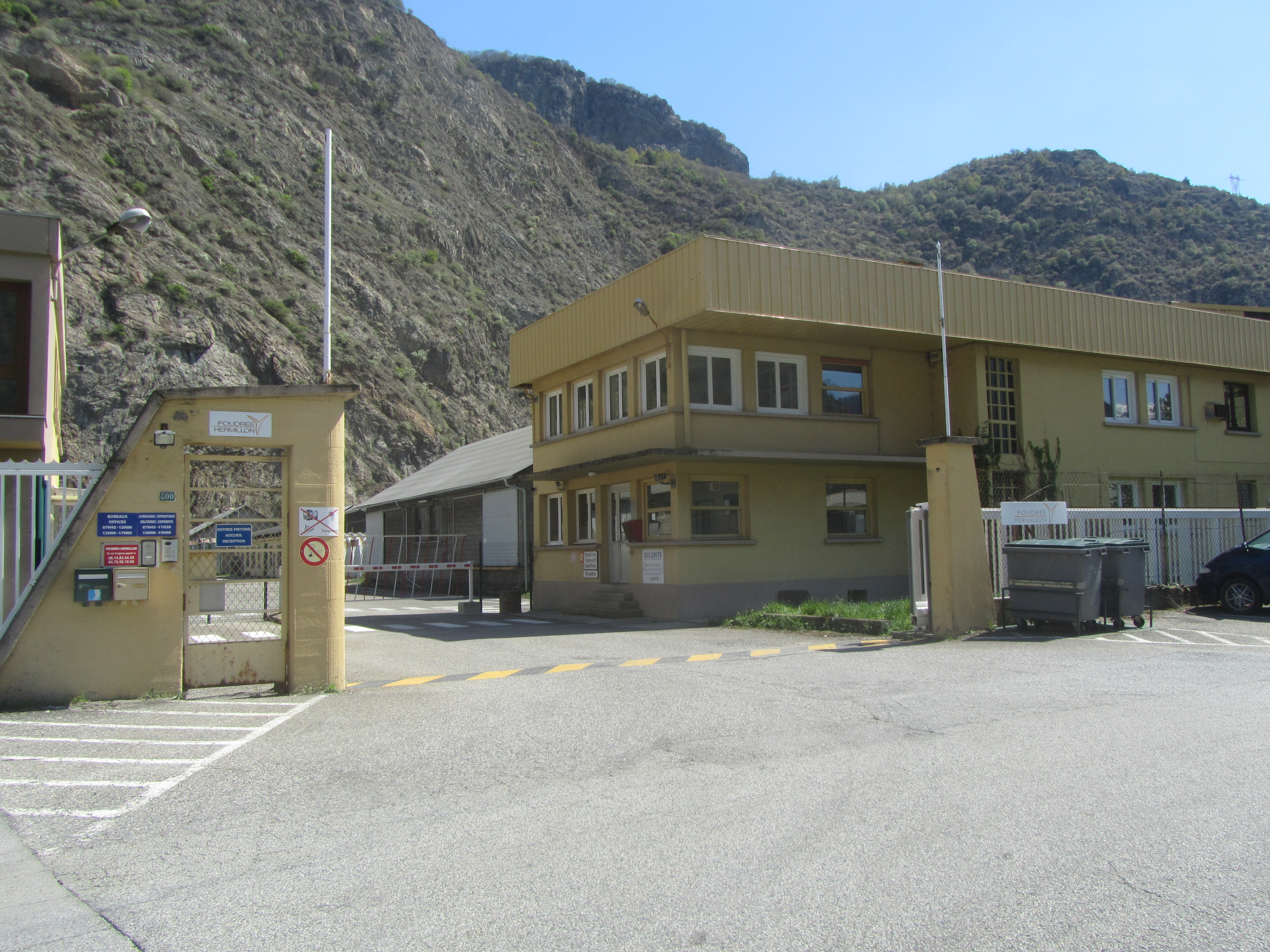 Entrée de l'usine Poudres Hermillon, filiale d'US Metal Powders, en 2018. L'usine est isolée du village par la falaise.